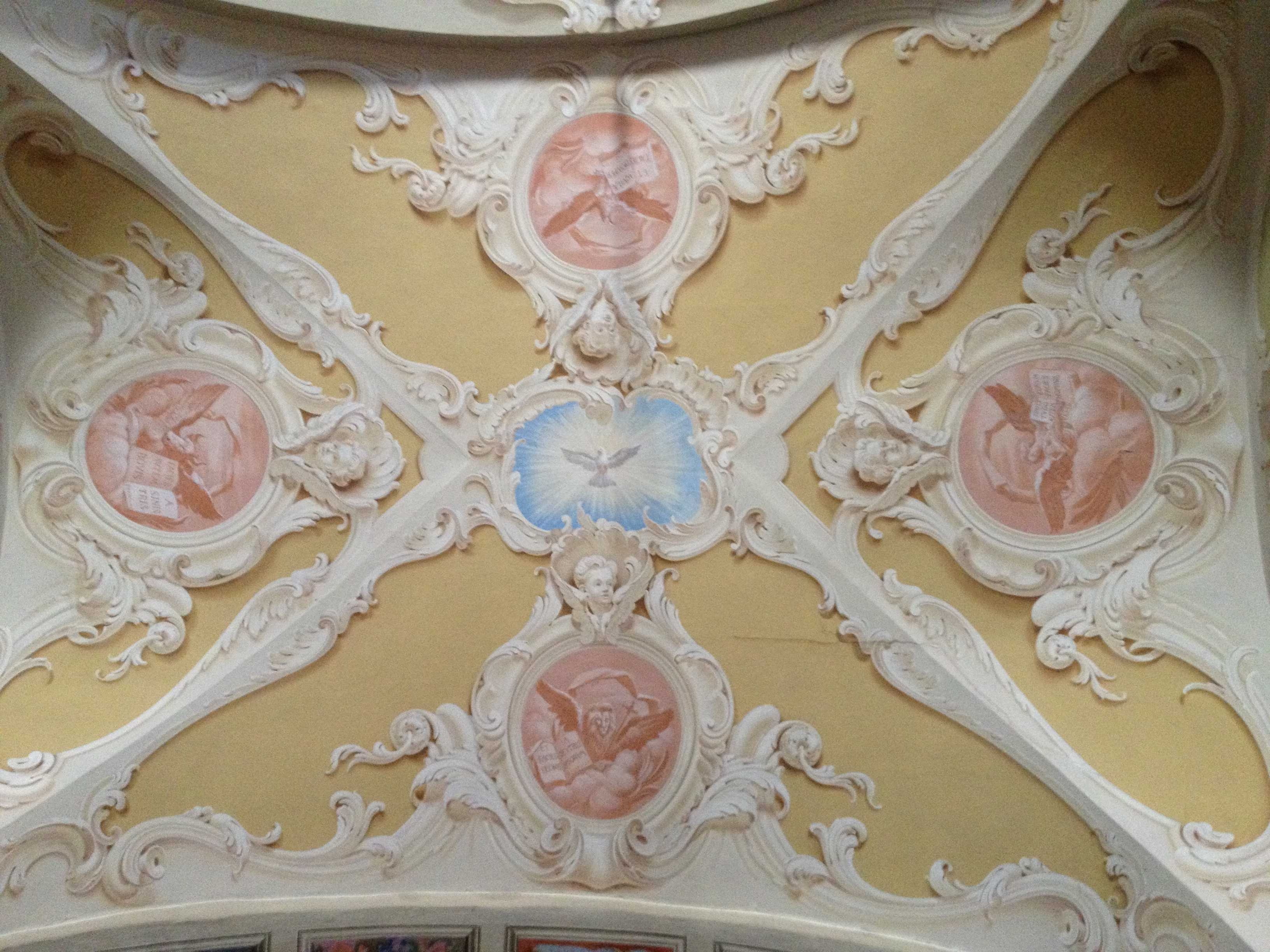 Affresco del presbiterio, dipinto da Angelino Capelli nella chiesa di Cicogni di Pecorara (PC)